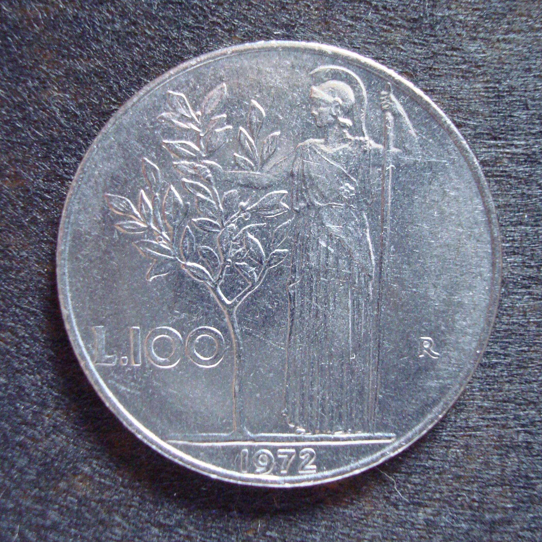 moneta da 100 lire